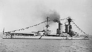 HMS Canada, despues Almirante Latorre (Chilean Navy).